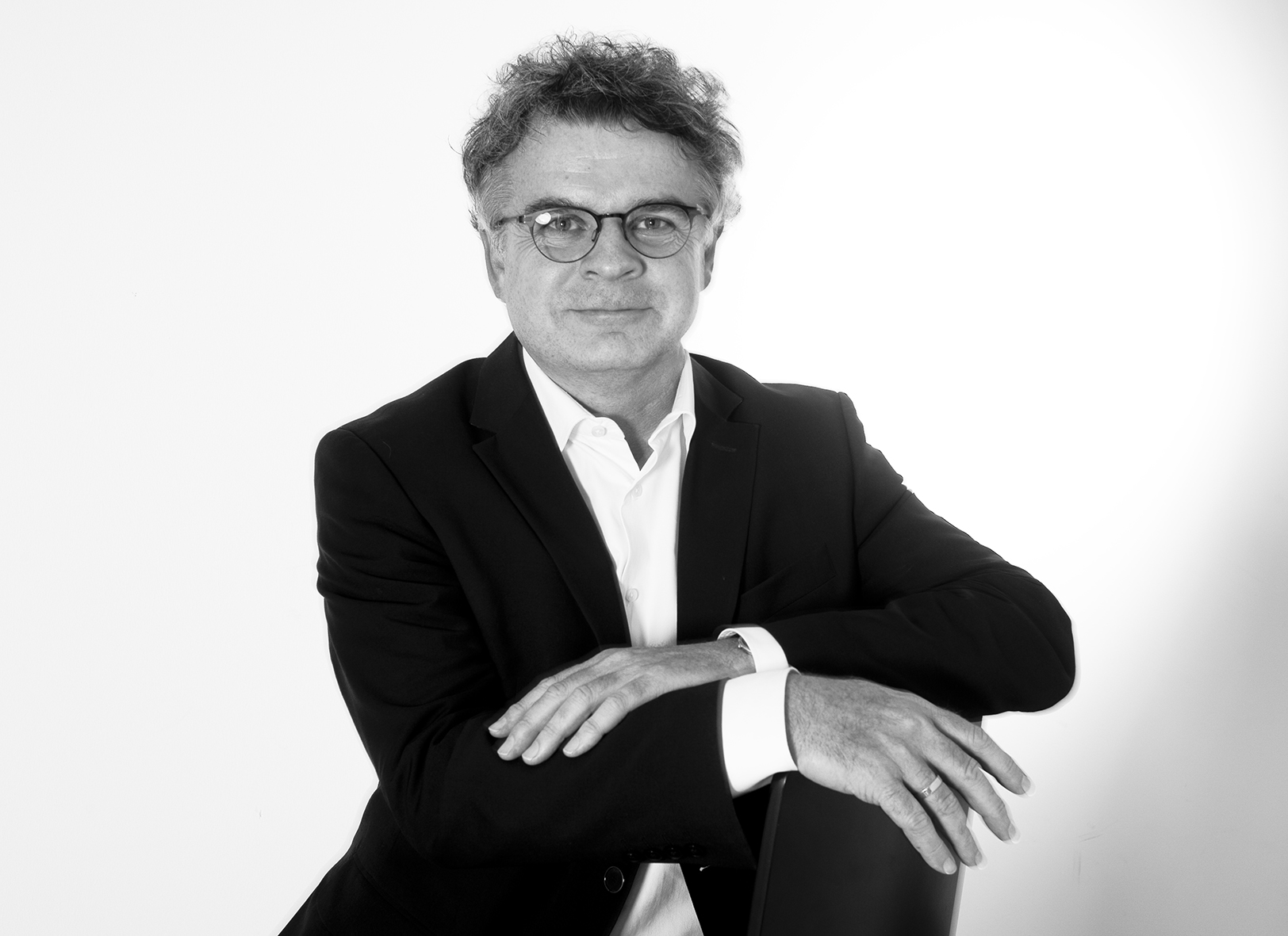 Portrait Gerd Jäger